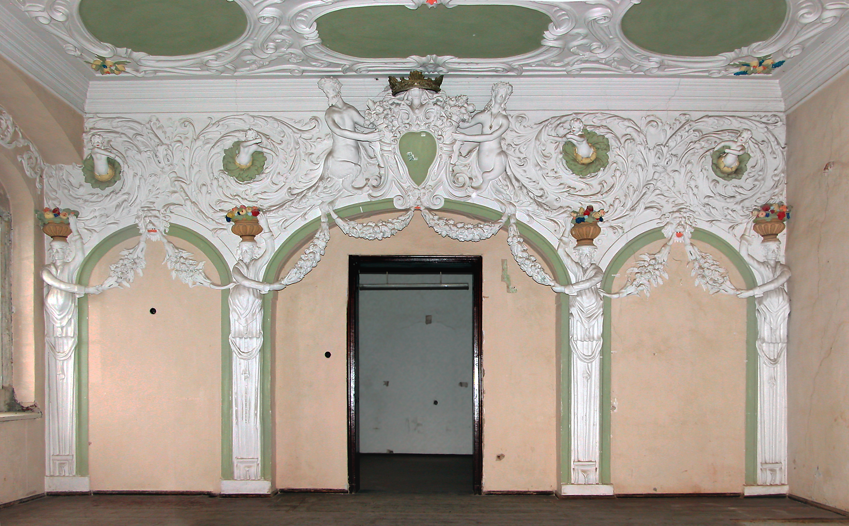 16.10.2006 01990 Großkmehlen: Wasserschloß aus dem 16. Jh. Raum im 1. Obergeschoß. [DSCN12056-057.TIF]20061016125MDR.JPG(c)Blobelt